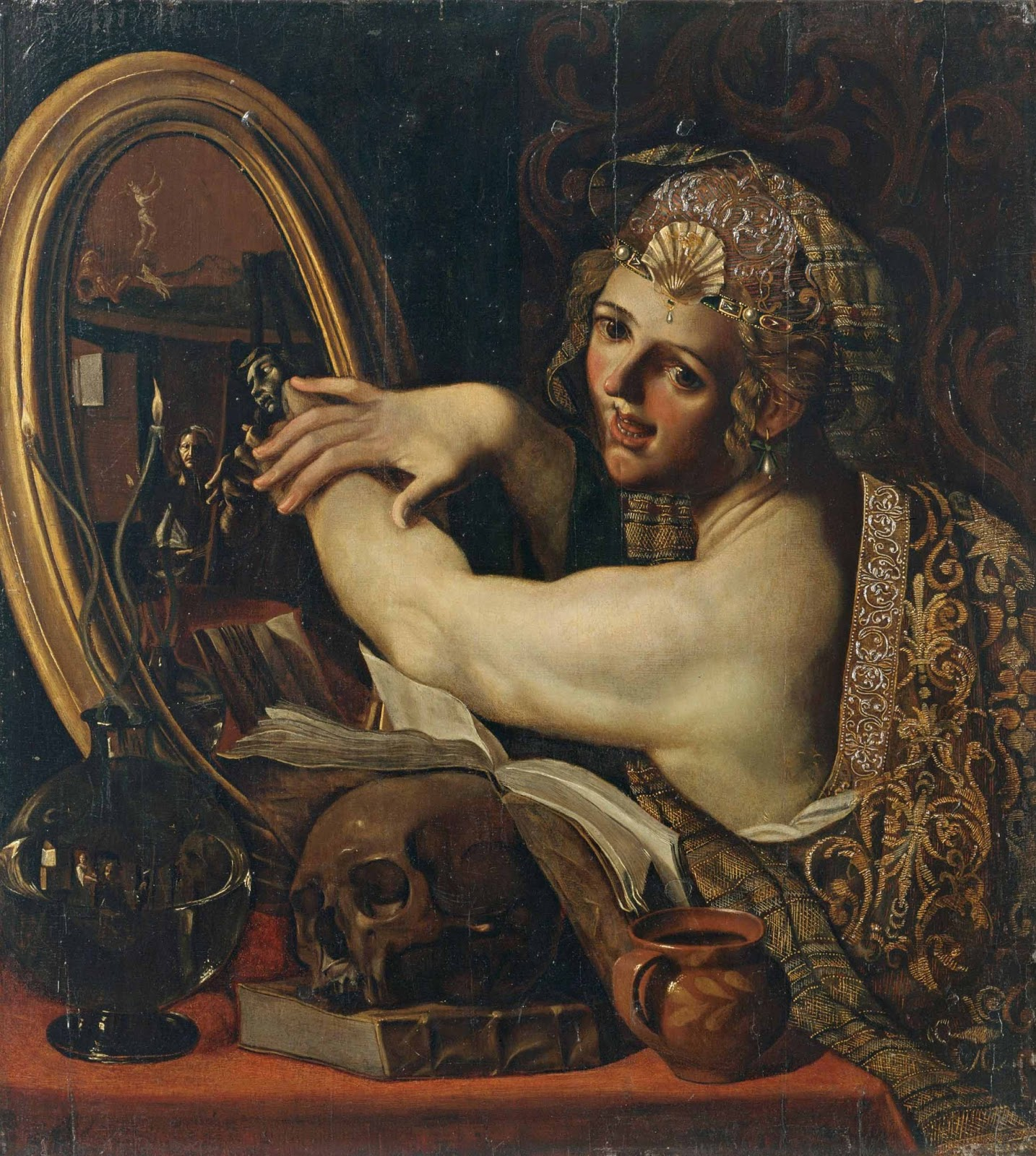 Hexenszenetitle QS:P1476,de:"Hexenszene" label QS:Lde,"Hexenszene"